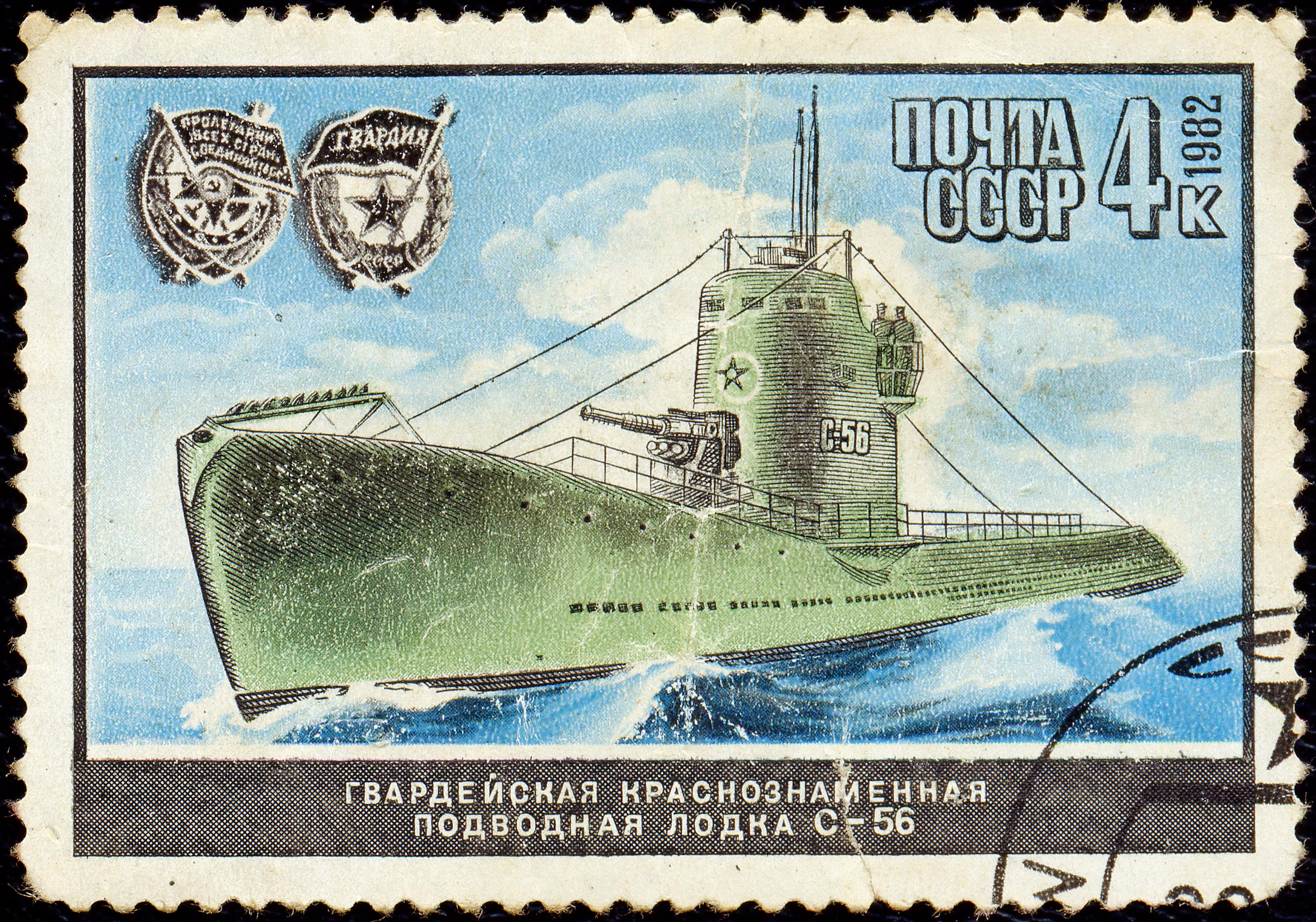 Почтовая марка СССР. 1982. Гвардейская краснознаменная подводная лодка С-56 CPA # 5334